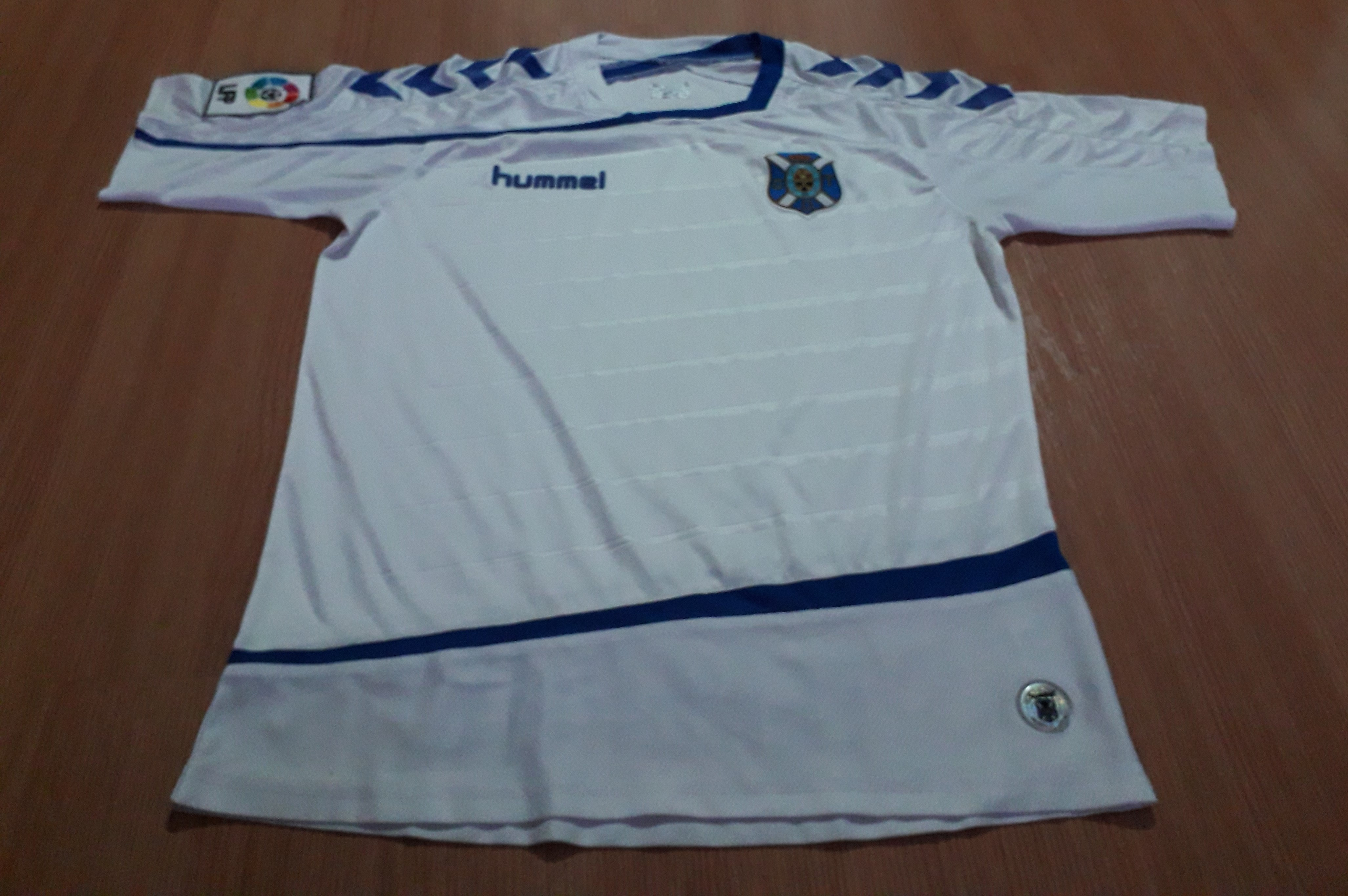 Equipación del Club Deportivo Tenerife para la temporada 15-16